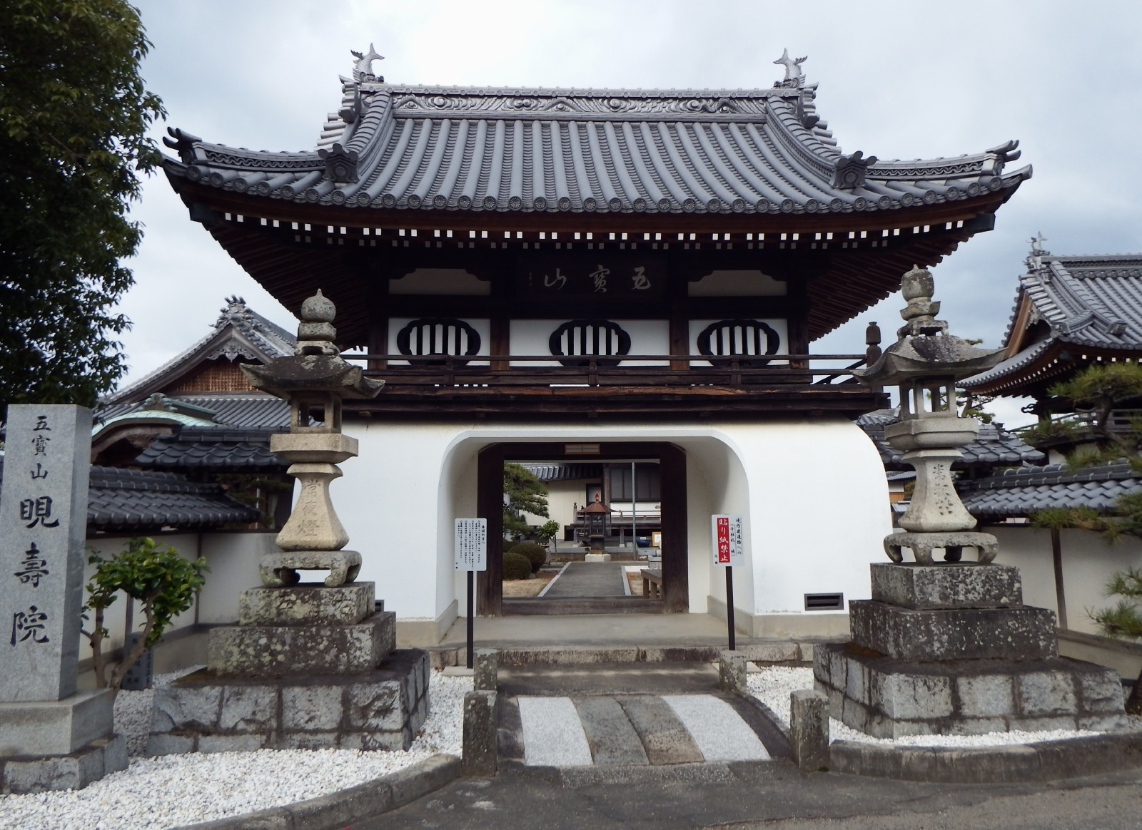 睍壽院の山門